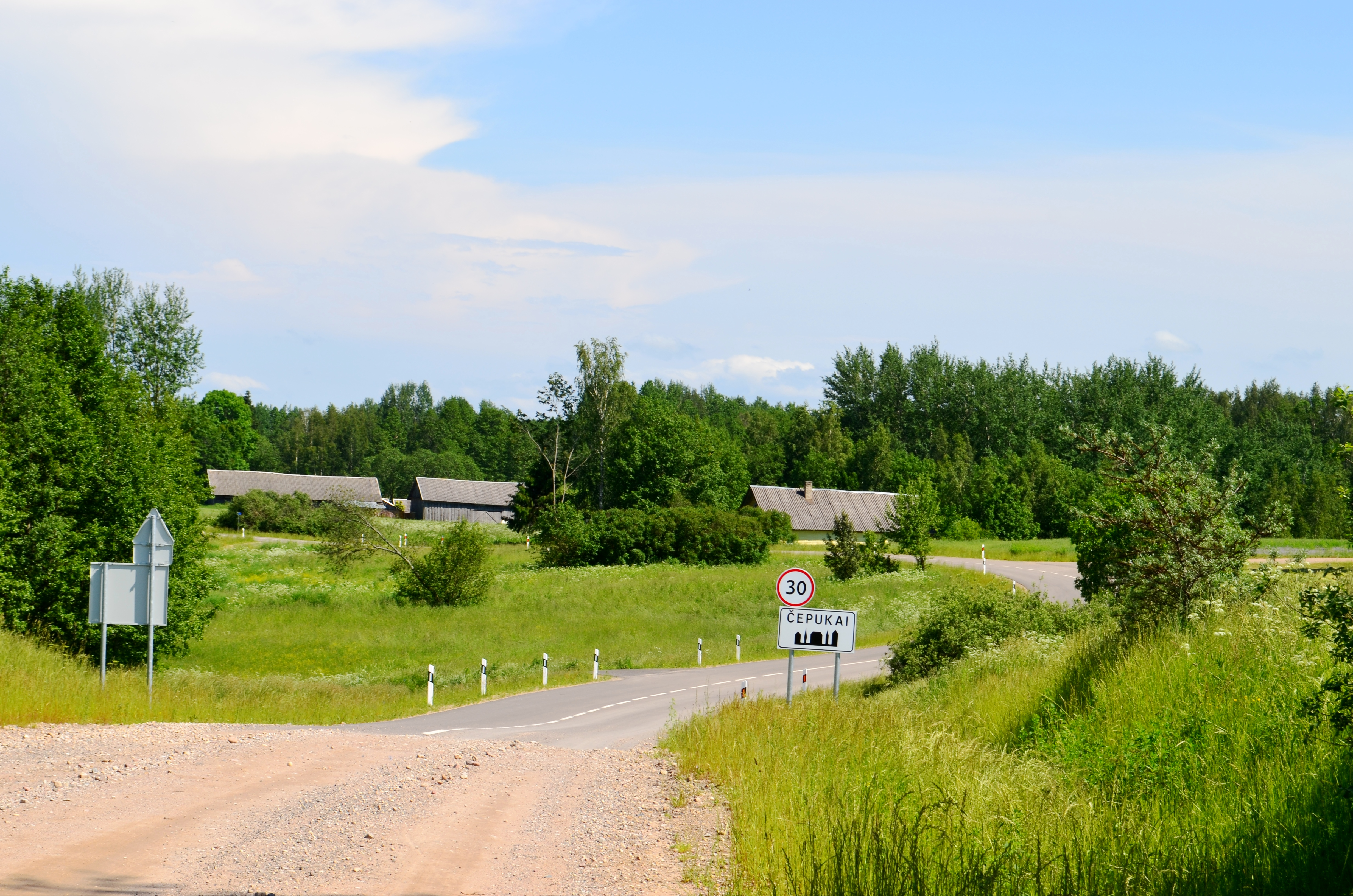 Čepukai, Ignalinos r.